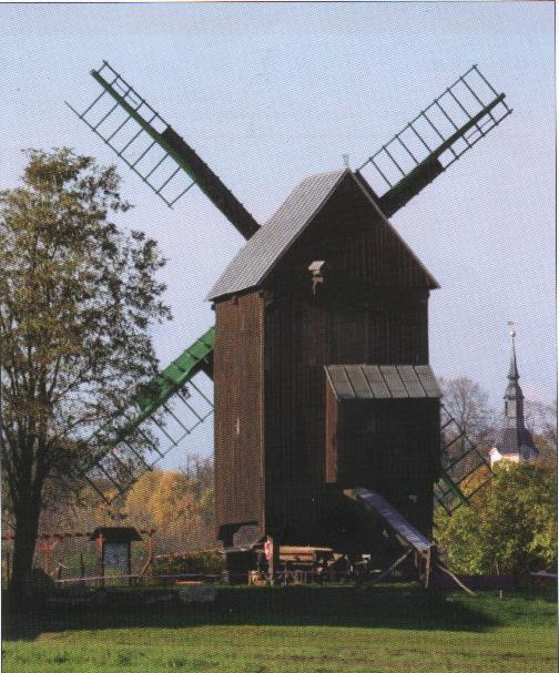 Bockwindmühle in Lebusa, Deutschland.